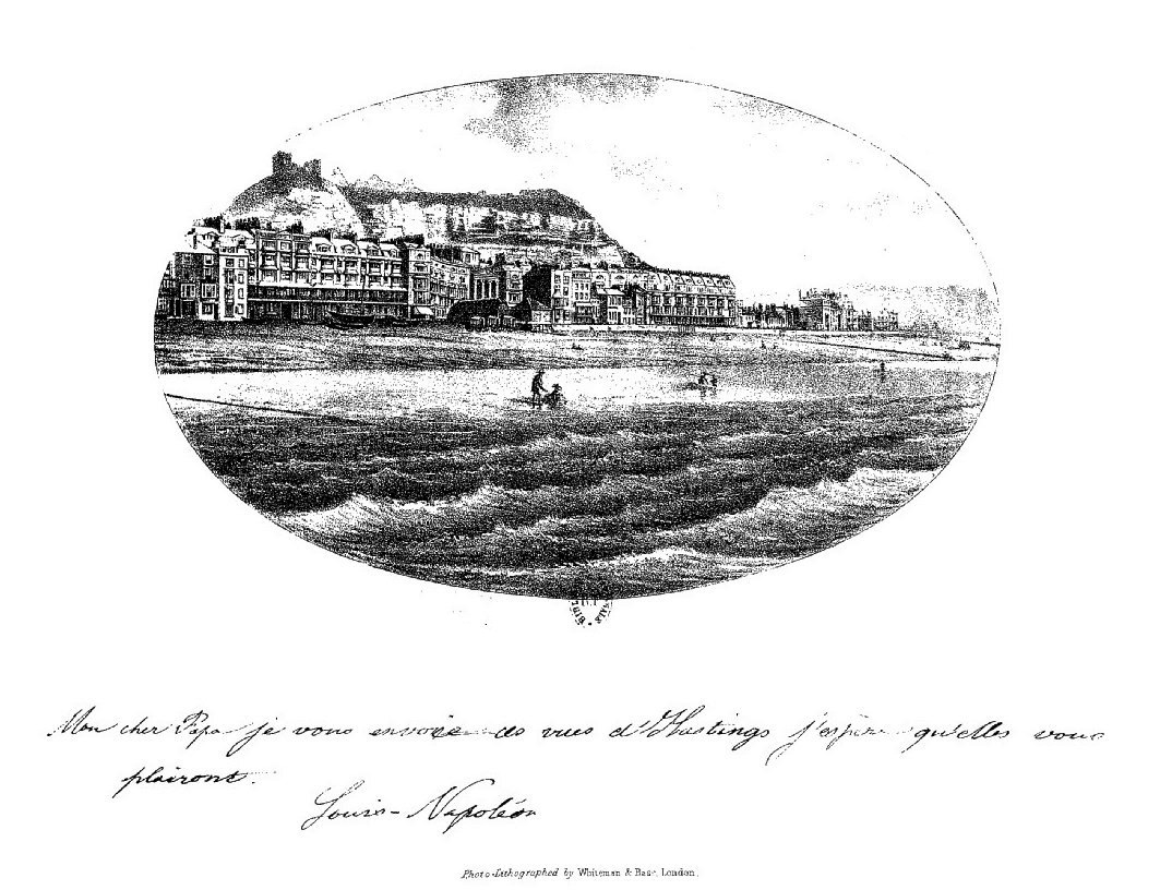 Fac-similé de la carte postale signée par le prince impérial pour son père Napoléon III et remise par Augustin Filon à Edmond Régnier.